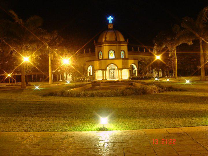 el seminario de culiacan